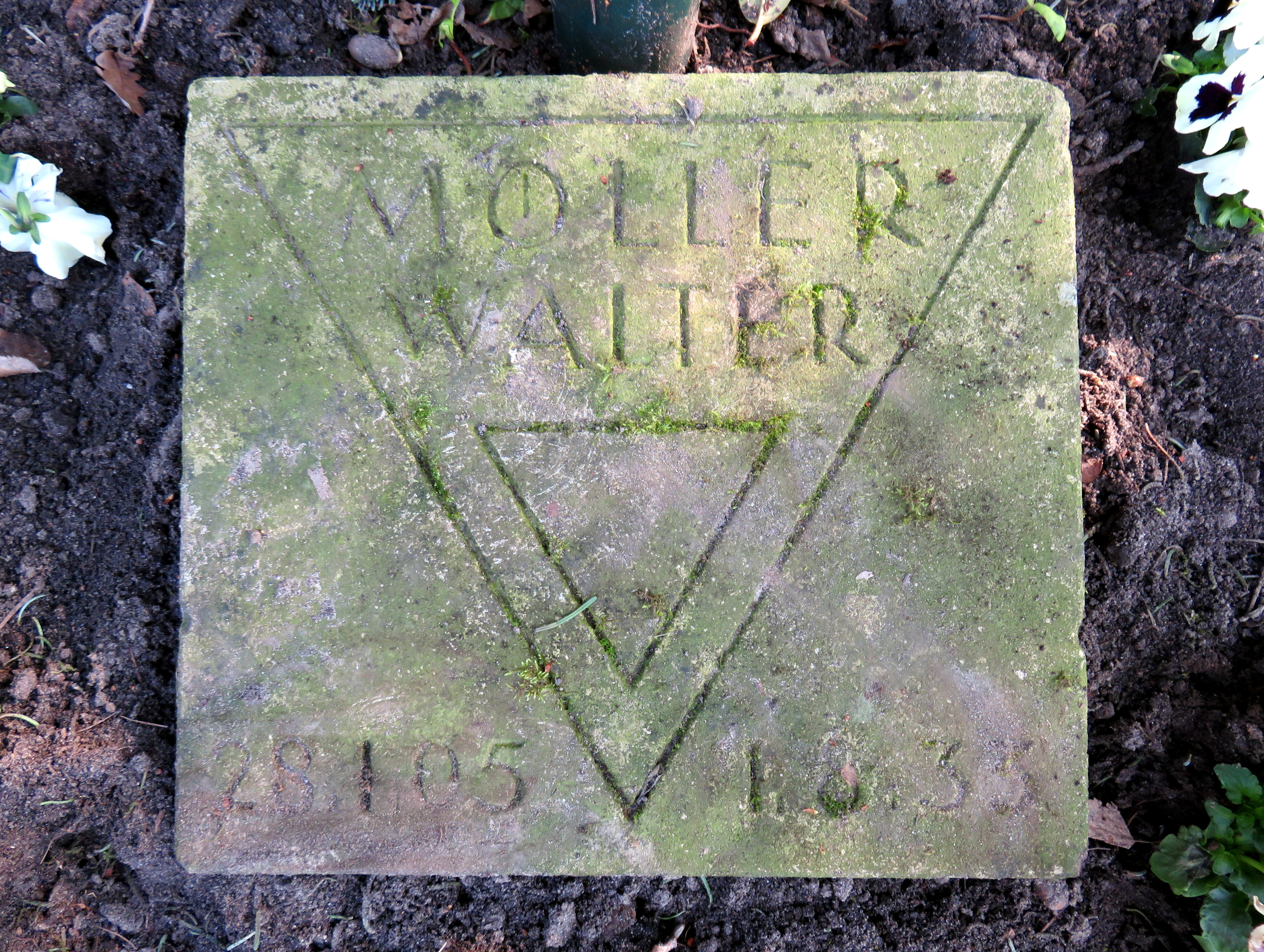 Kissenstein für den deutschen Widerstandskämpfer Walter Möller im Ehrenhain Hamburgischer Widerstandskämpfer, Friedhof Ohlsdorf, Planquadrat K 5 (Bergstraße gegenüber dem Museum).